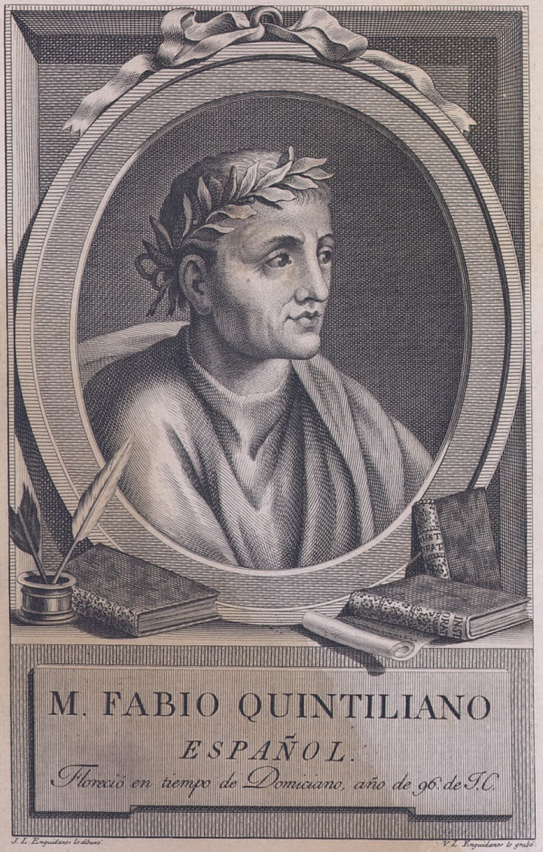 Portrait de Quintilien (d'après un dessin de son frère José López Enguídanos, à l'imprimante de l'Administration de l'Arbitre royal de bienfaisance, Madrid)